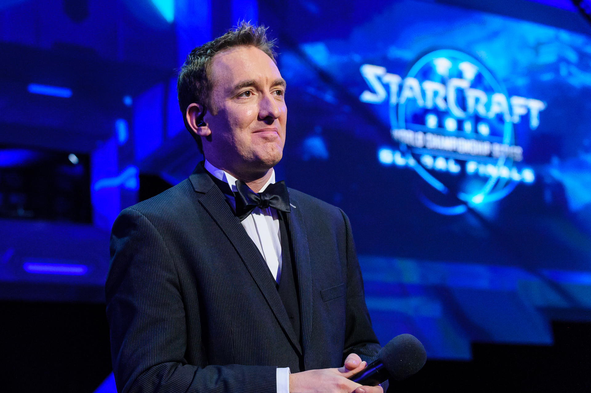 Paul "ReDeYe" Chaloner à la BlizzCon 2014